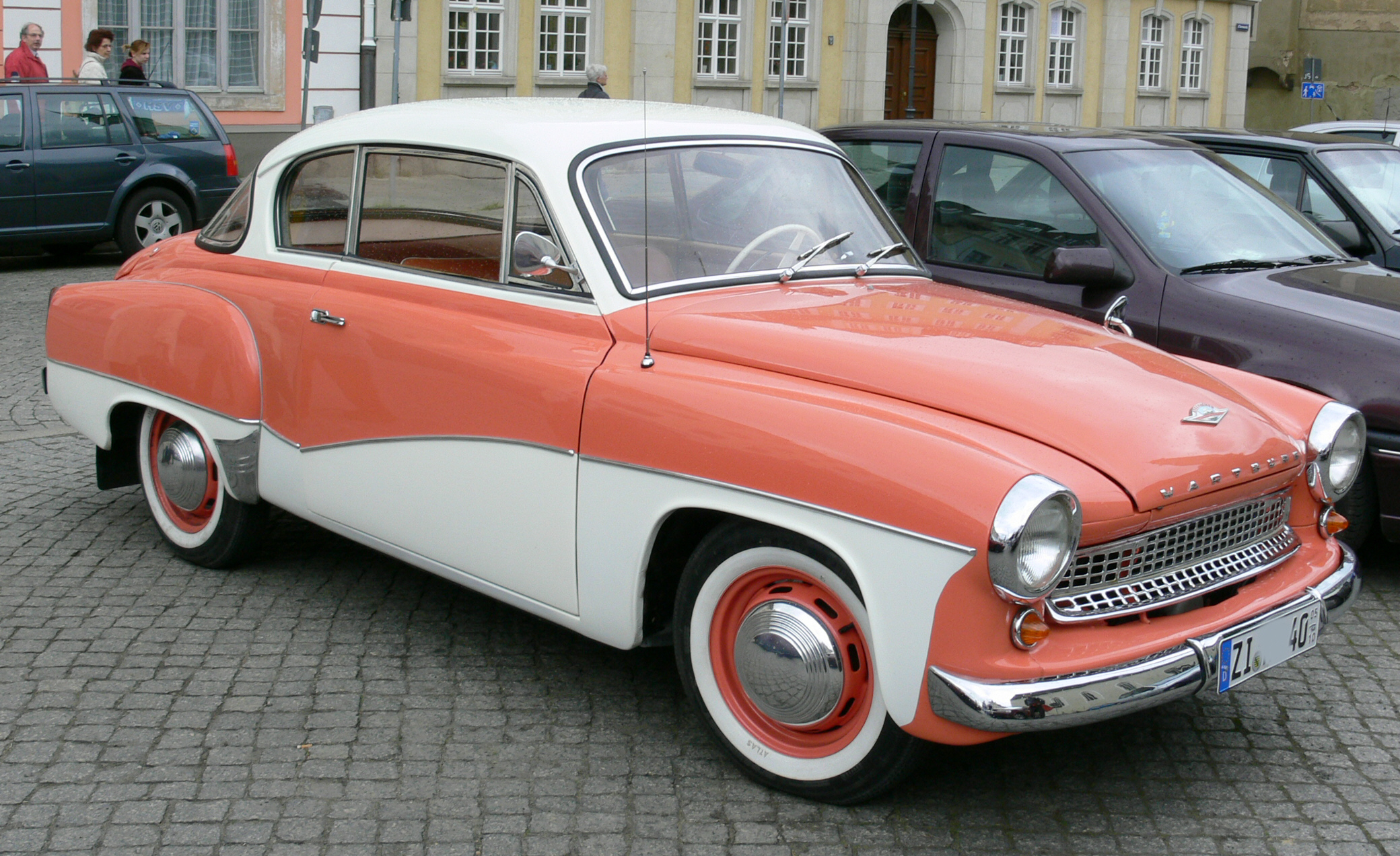 Wartburg 311/3 Coupé in Görlitz